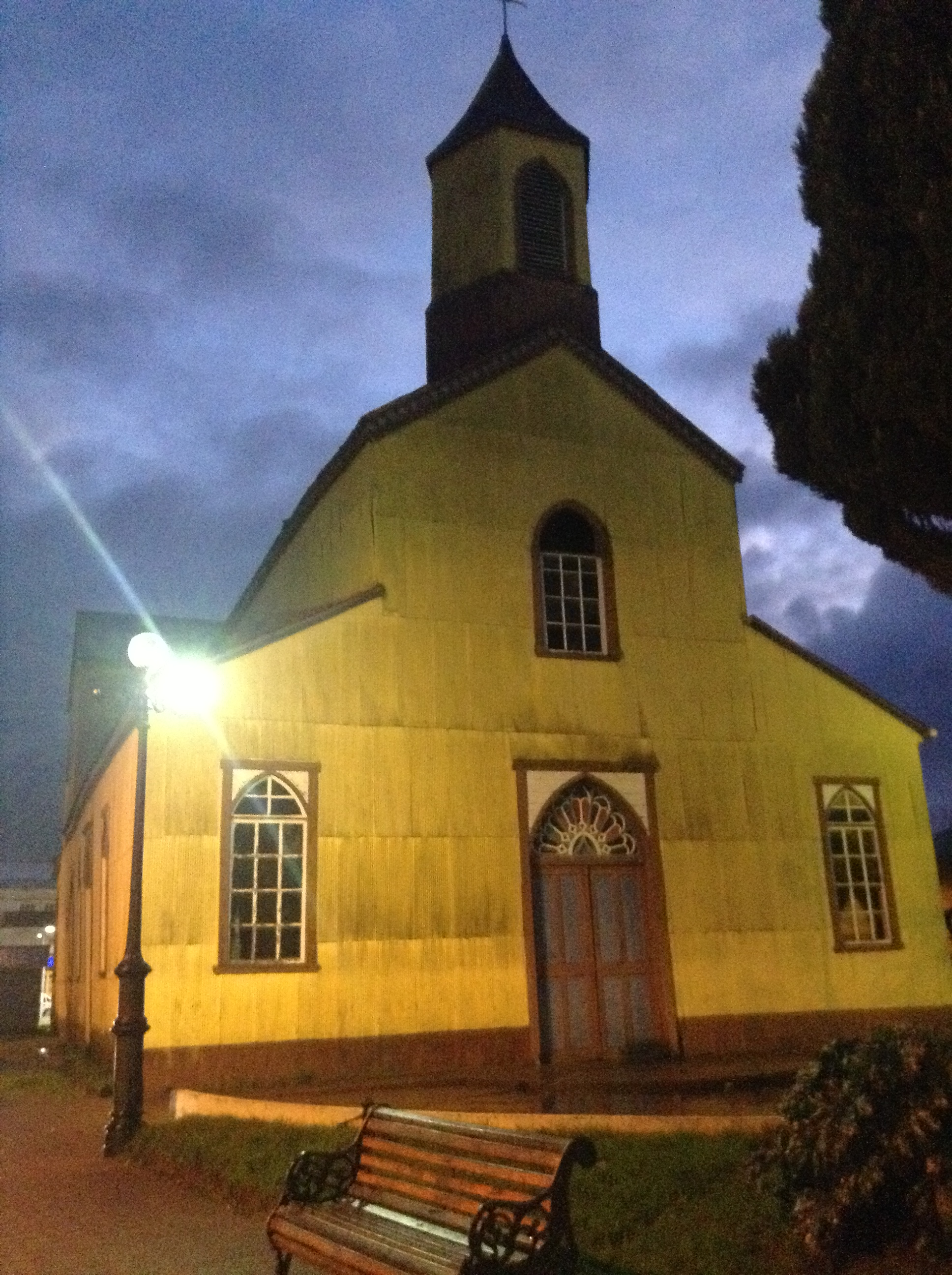 Iglesia de Nuestra Señora del Rosario de Maullín